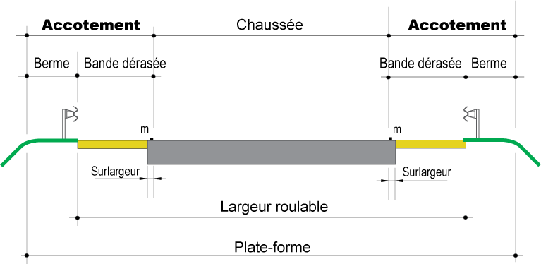 Terminologie routière – Accotement, avec partie stabilisée